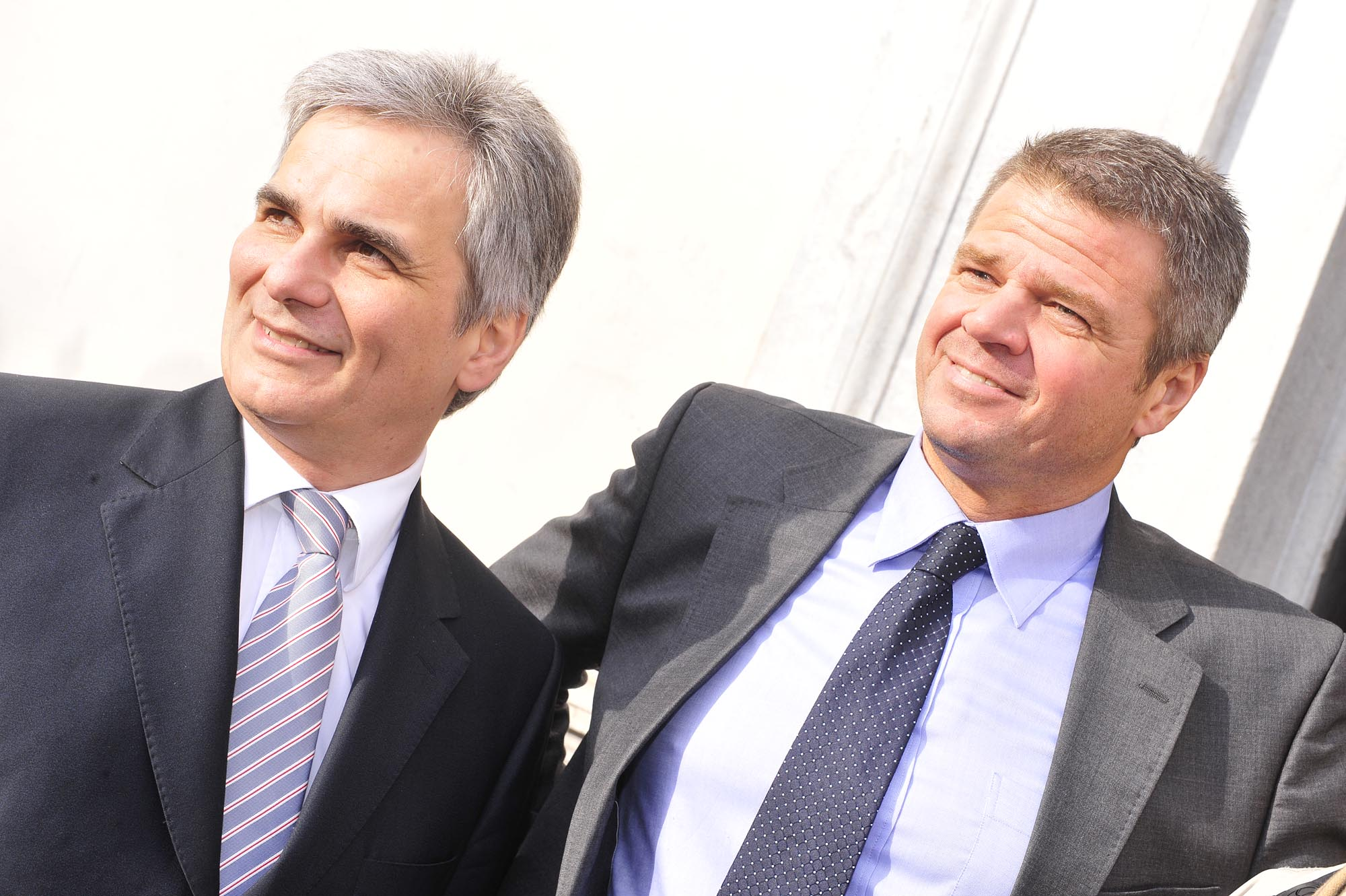 Bundeskanzler Werner Faymann in Begleitung von LHStv. Reinhart Rohr und Bürgermeister Gerhard Köfer in Spittal an der Drau. Foto: SPÖ / Johannes Zinner